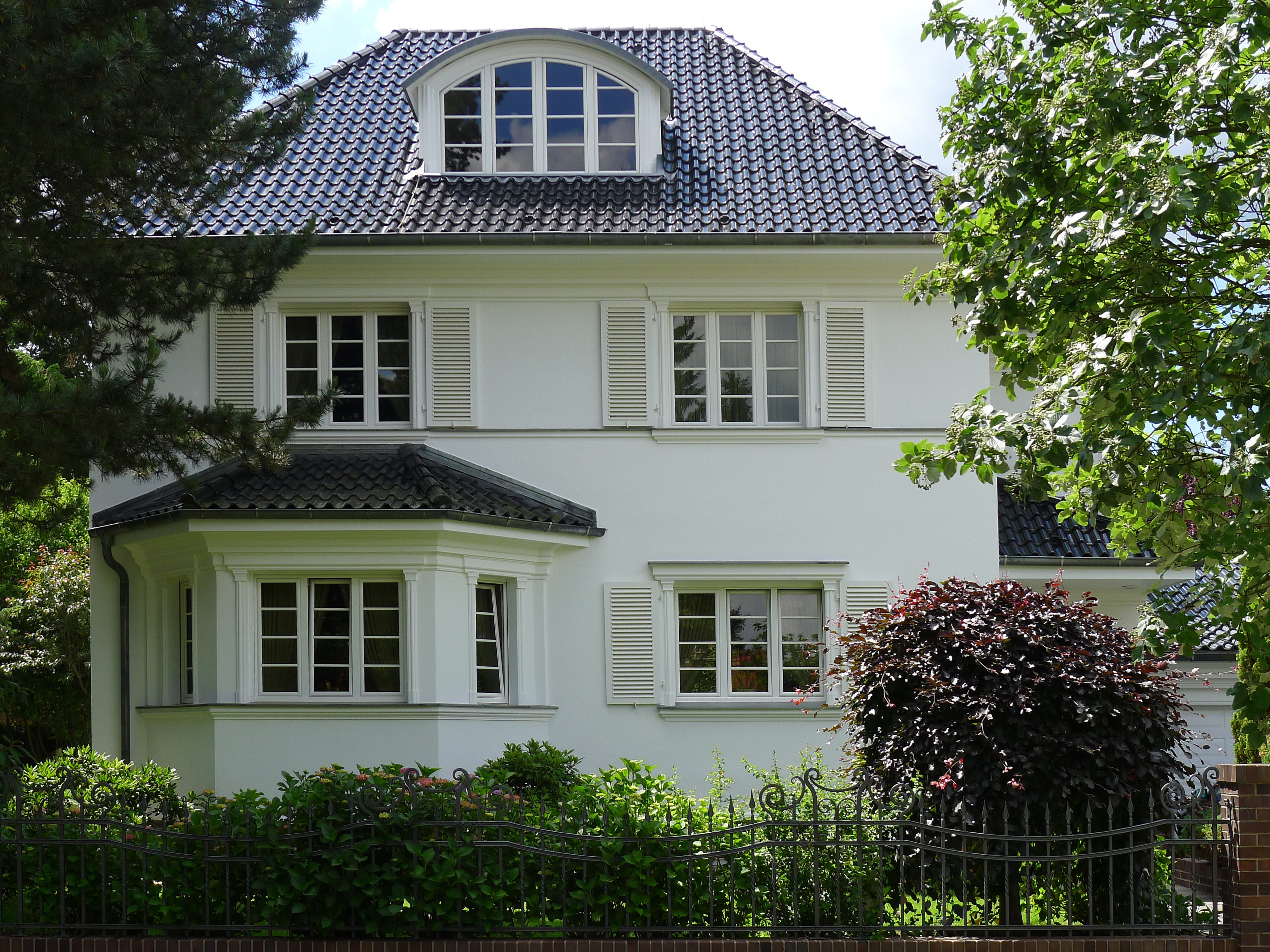 Wohnhaus